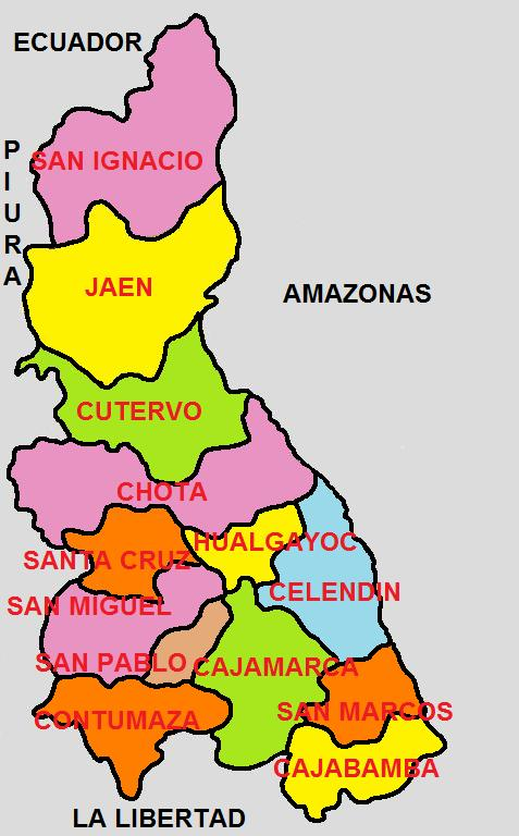 Imagen que muestra la División Politica del Departamento de Cajamarca, una de las 25 circunscripciones en que se divide el Perú